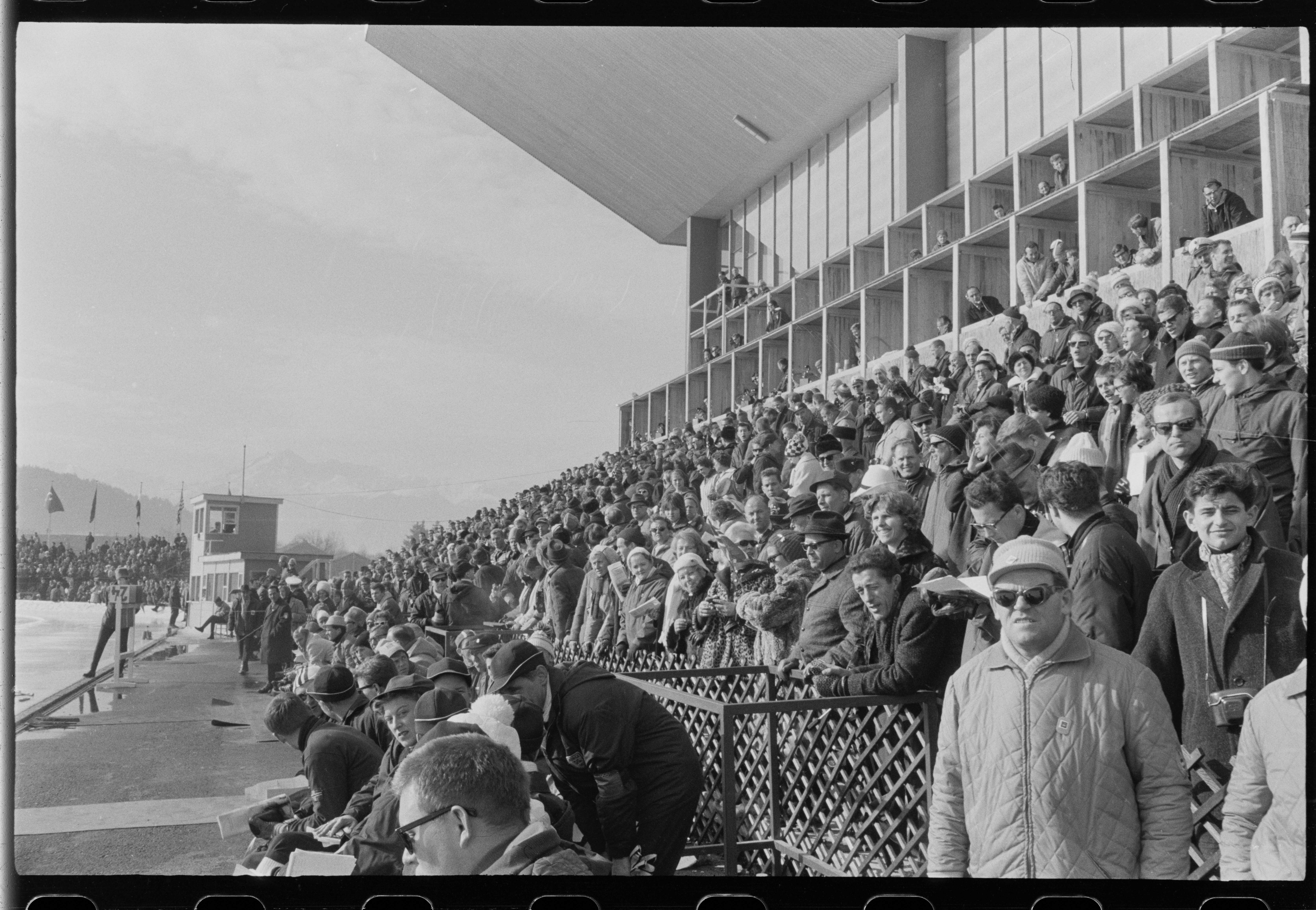 Bildet er hentet fra Arkivverket. OL Innsbruck 1964 500m skøyter Gull Arkivinstitusjon : Riksarkivet Arkivnavn : Billedbladet NÅ Sted : Østerrike, Tirol, Innsbruck, Innsbruck Avbildet